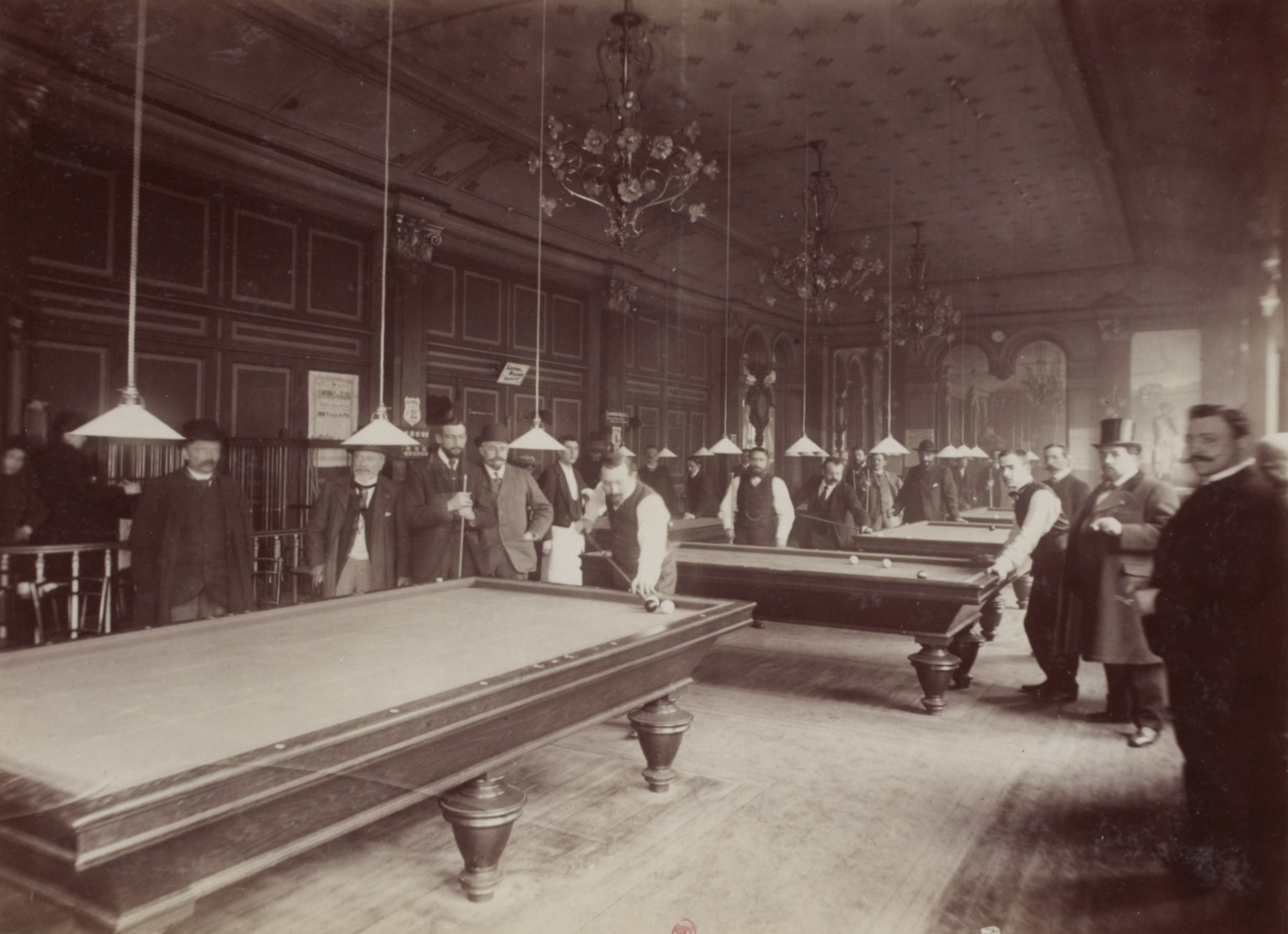 [Collection Jules Beau. Photographie sportive] : T. 20. Année 1903 / Jules Beau : F. 29. Billard, Championnat du monde, Académie Nationale des Amateurs, Eldorado